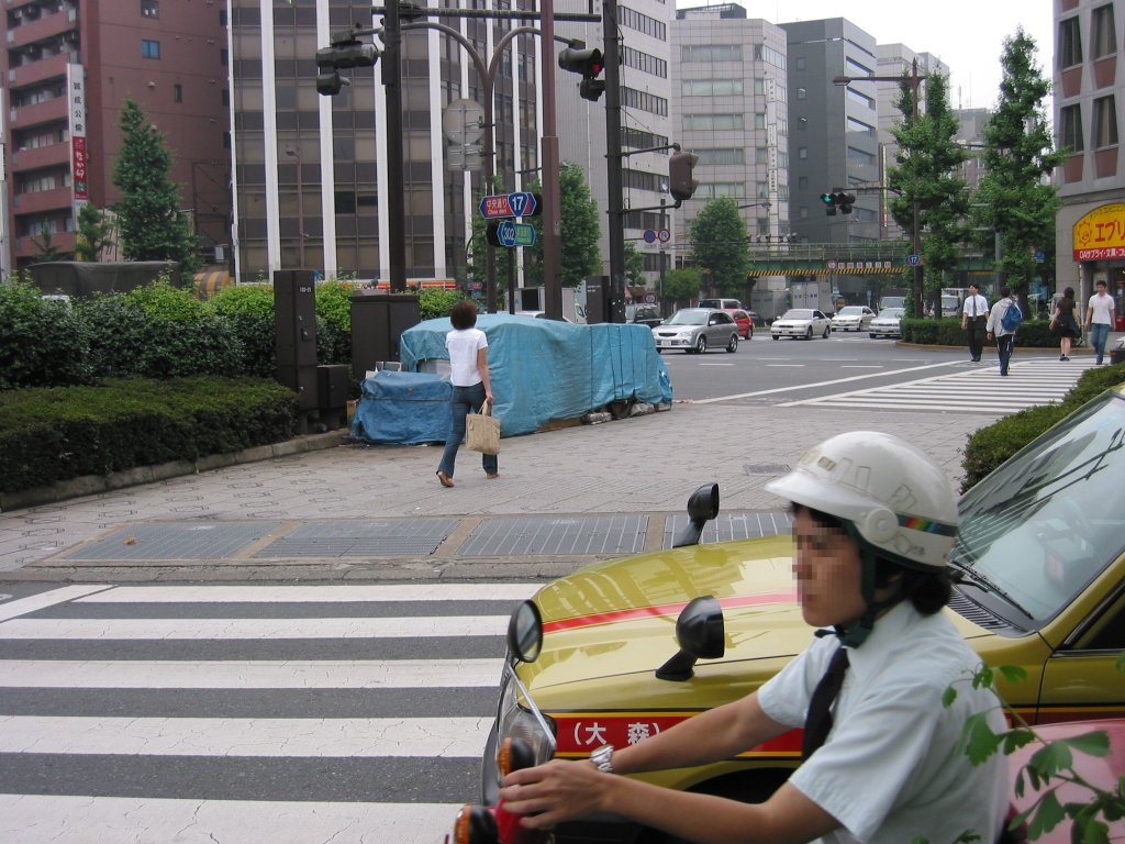 Von einem Obdachlosen selbst gebaute Notunterkunft auf einer Verkehrsinsel in Tokyo